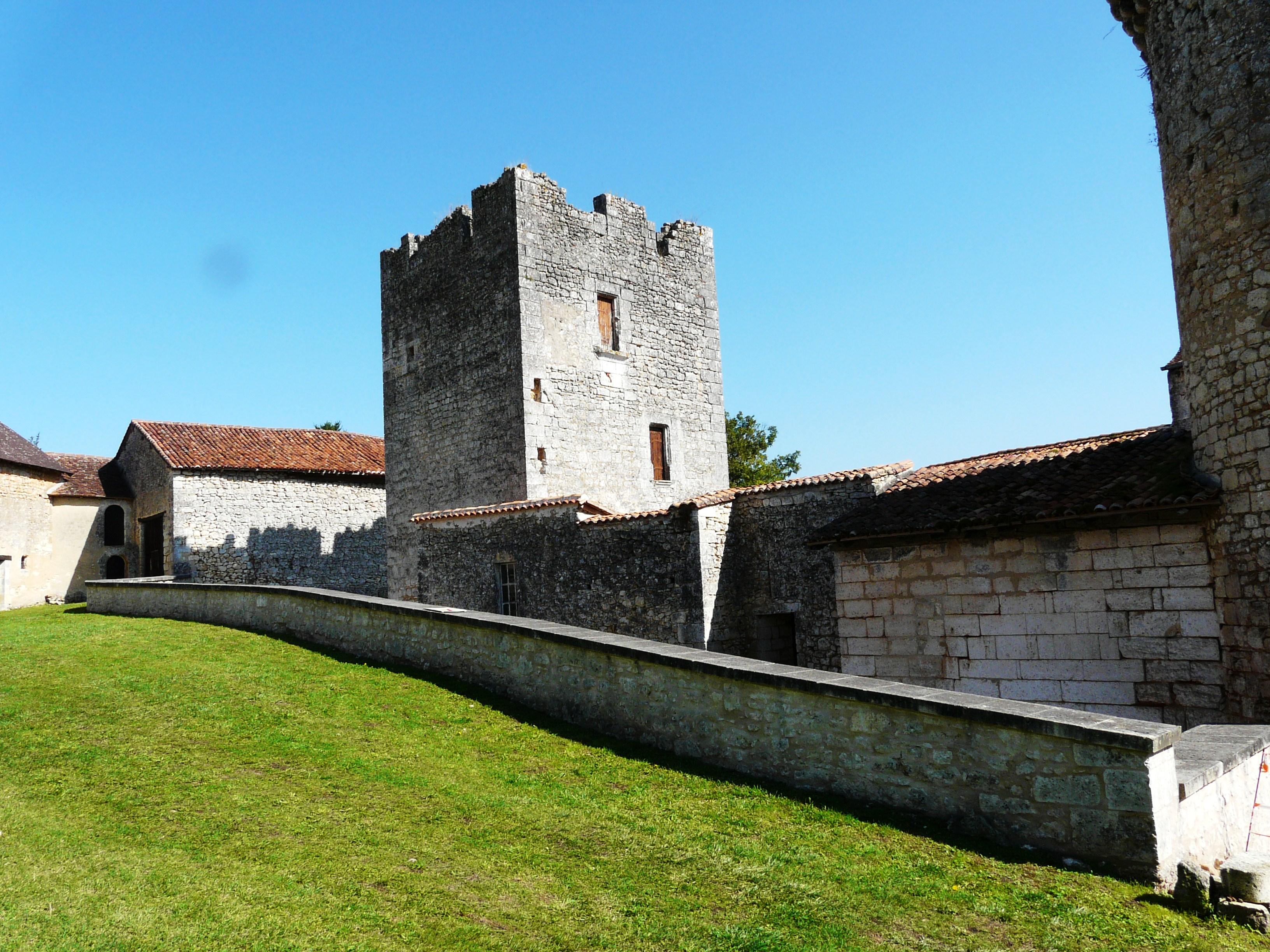 Le château des Bernardières, Champeaux-et-la-Chapelle-Pömmier, Dordogne, France Object location45° 28′ 37″ N, 0° 33′ 53″ E